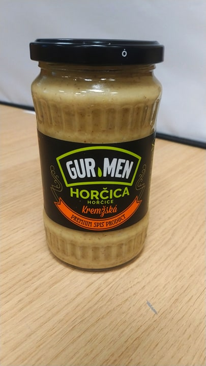 Kremžská horčica na stole